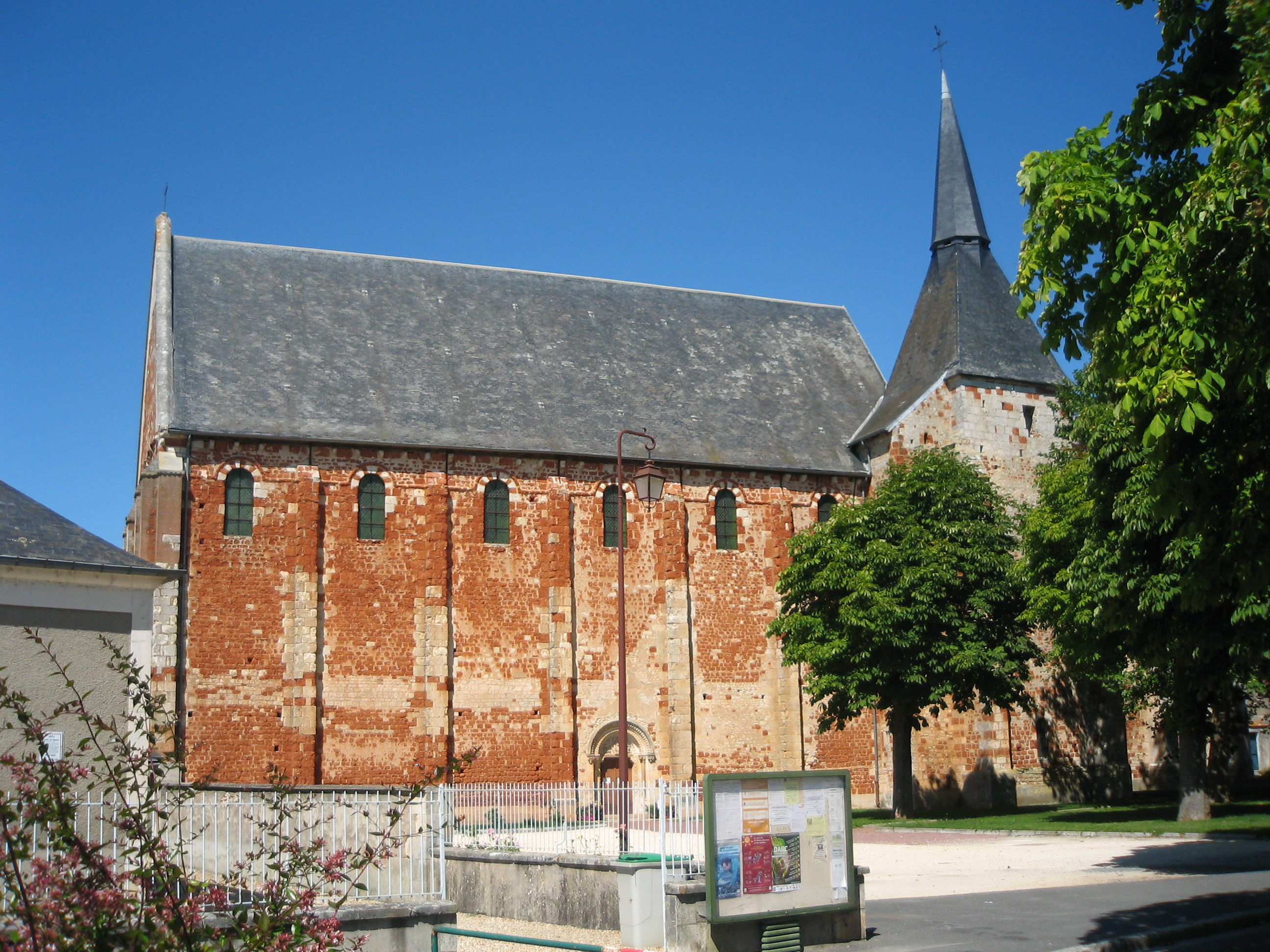 Eglise saint Michel, XIIe, fin du XVe ou début XVIe et XIXe, Chârost.